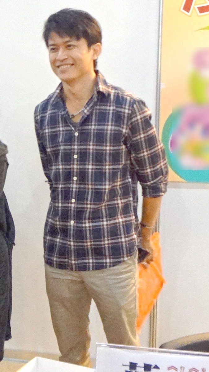 中文（台灣）: 2013臺中動漫節，臺灣漫畫家葉明軒在簽名會後與愛好者合照。